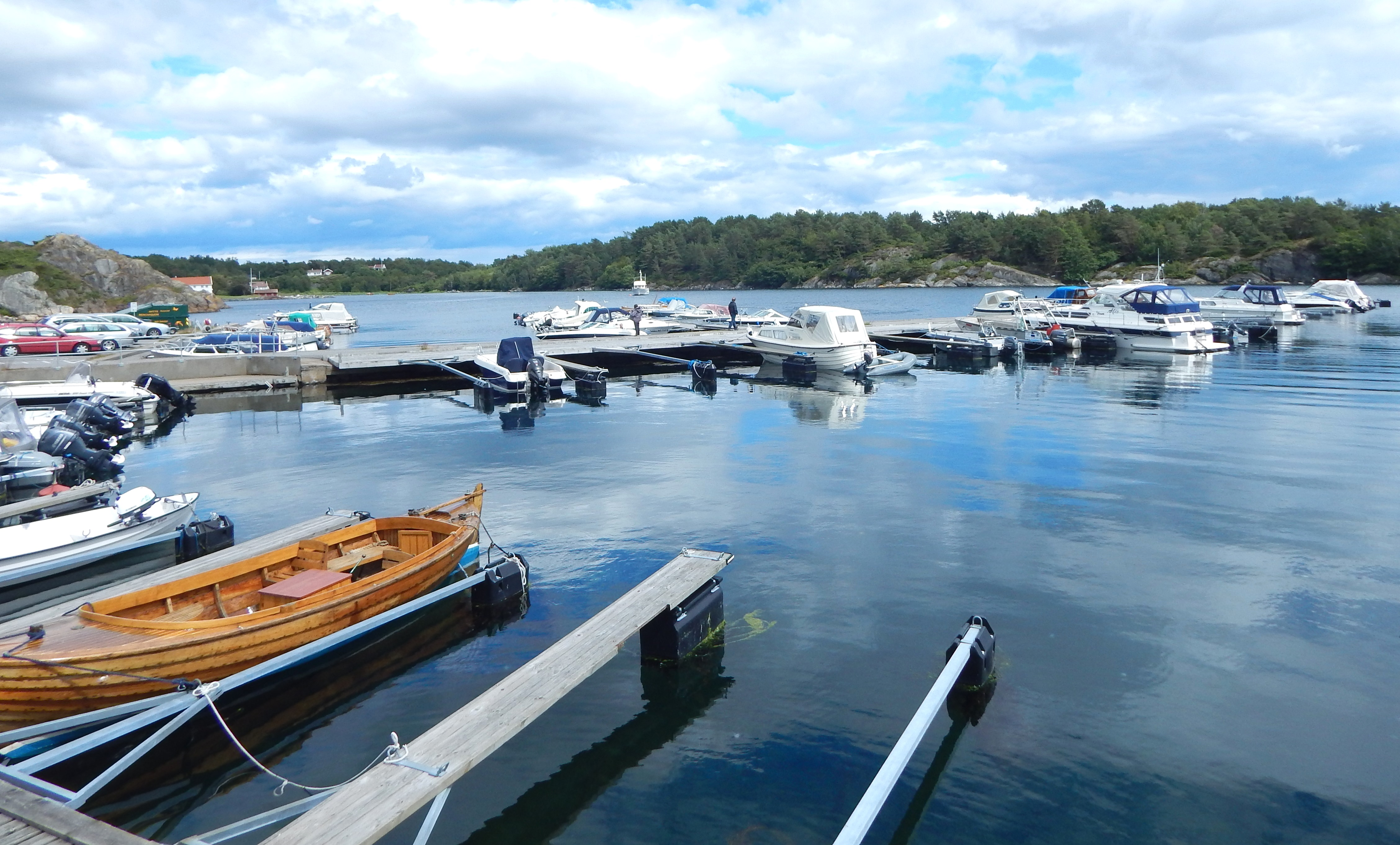 Homborsund brygge